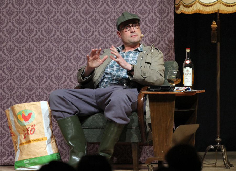 Christian Macharski in seiner Rolle als Hastenraths Will (April 2012)